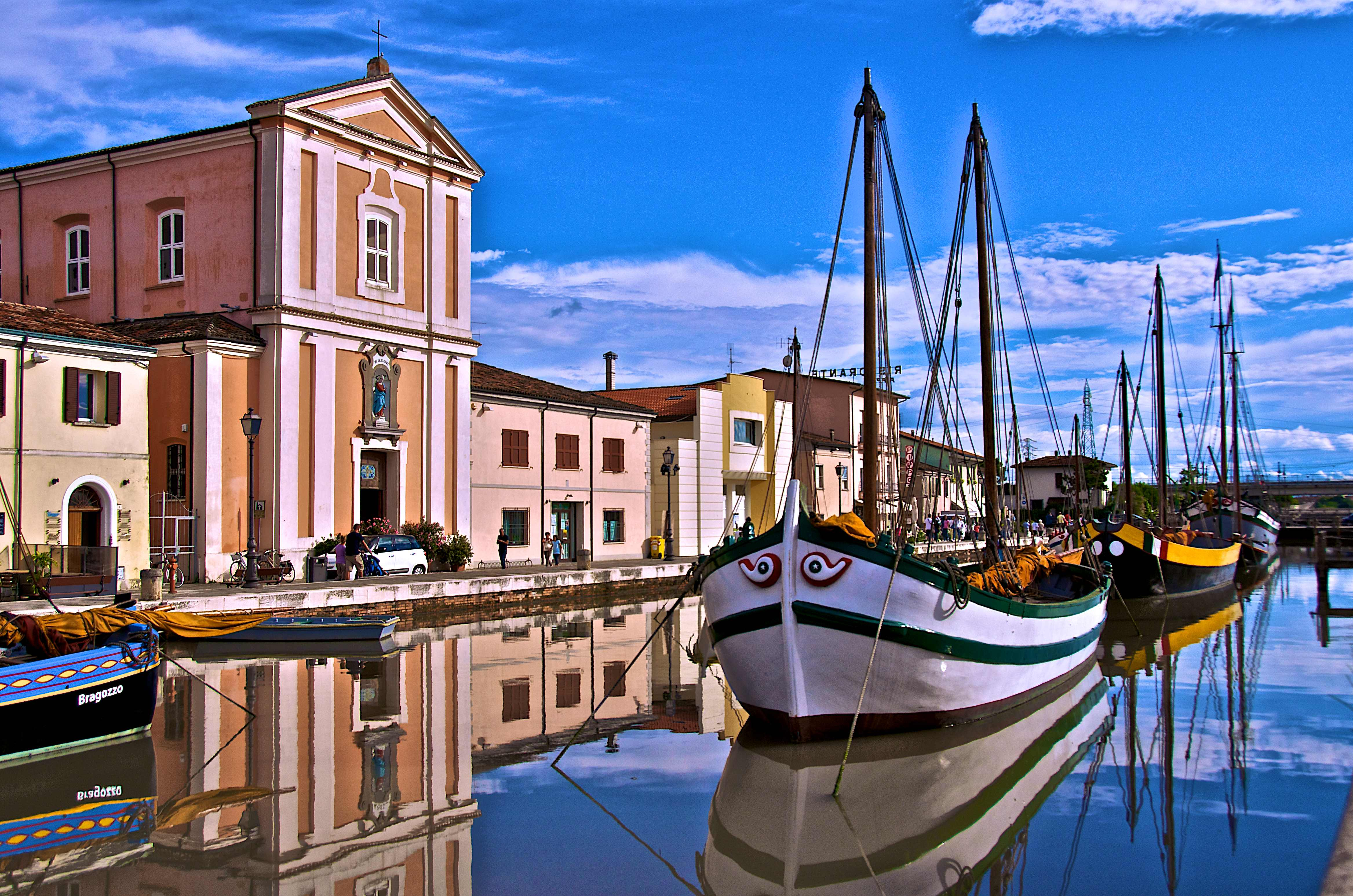 Porto Canale Leonardesco This is a photo of a monument which is part of cultural heritage of Italy.